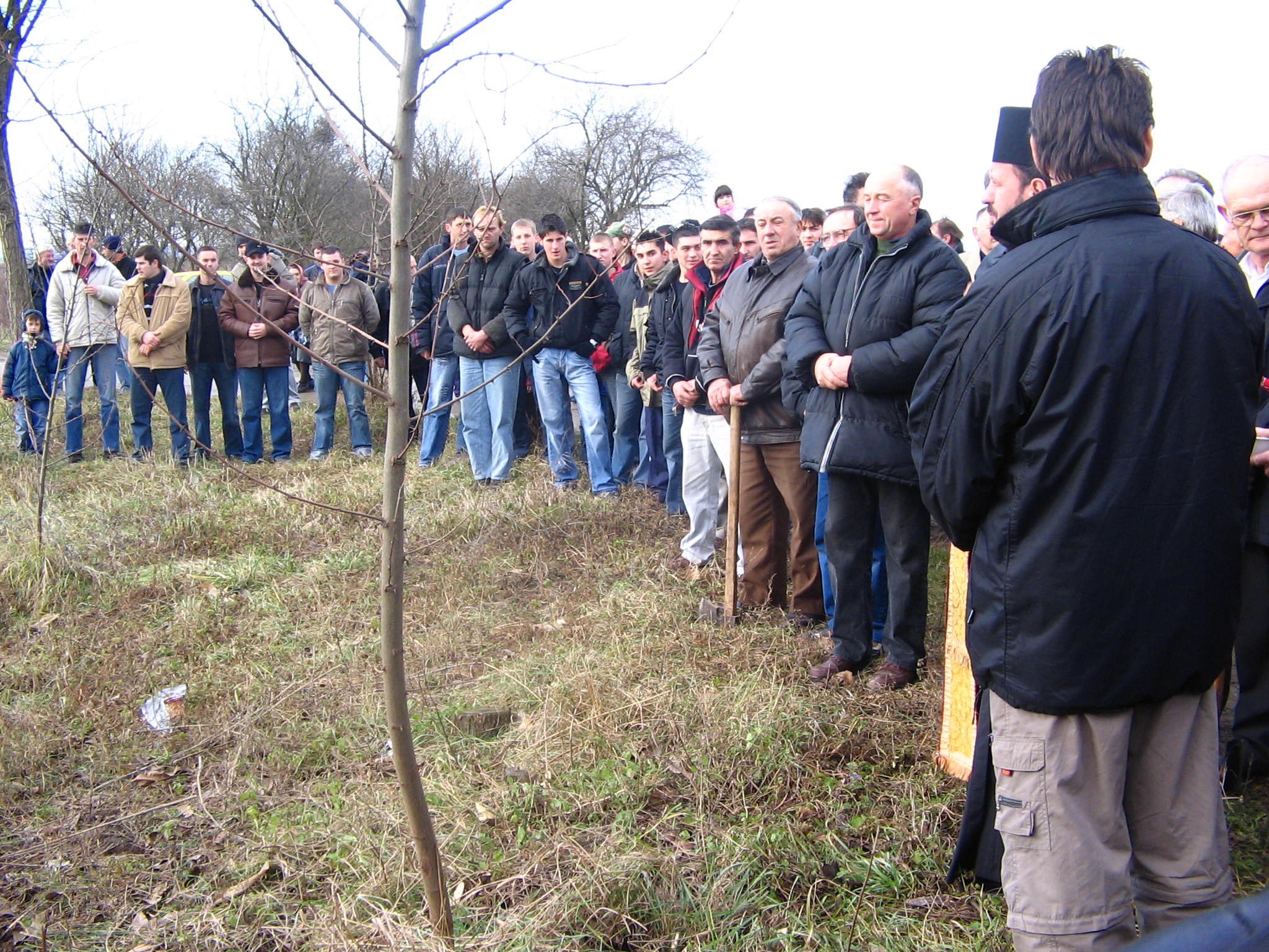 Moja slika snimljena licnim digitalnim aparatom Template:Jv-ja